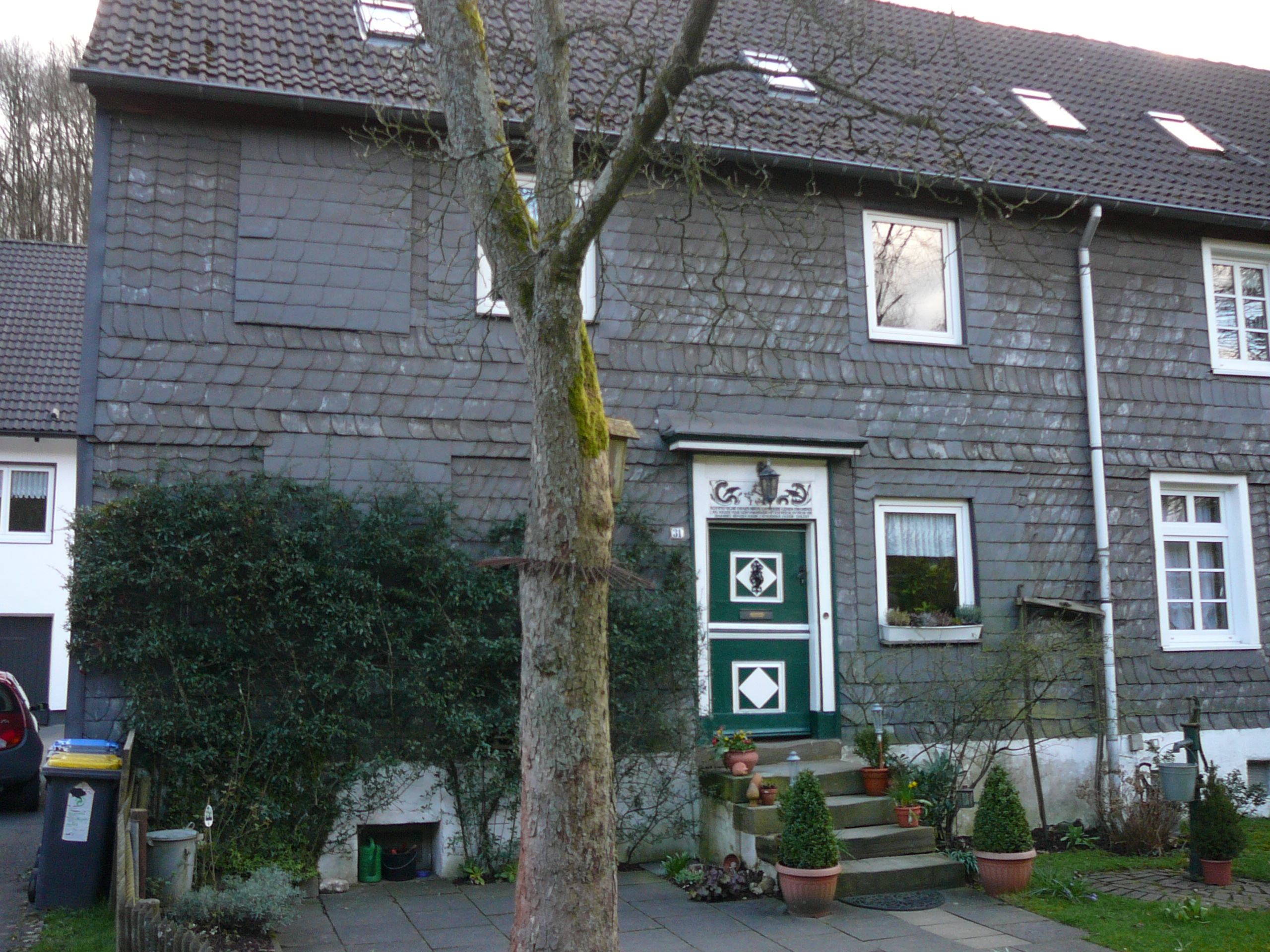 In der Beek, Wuppertal/Katernberg-Uellendahl